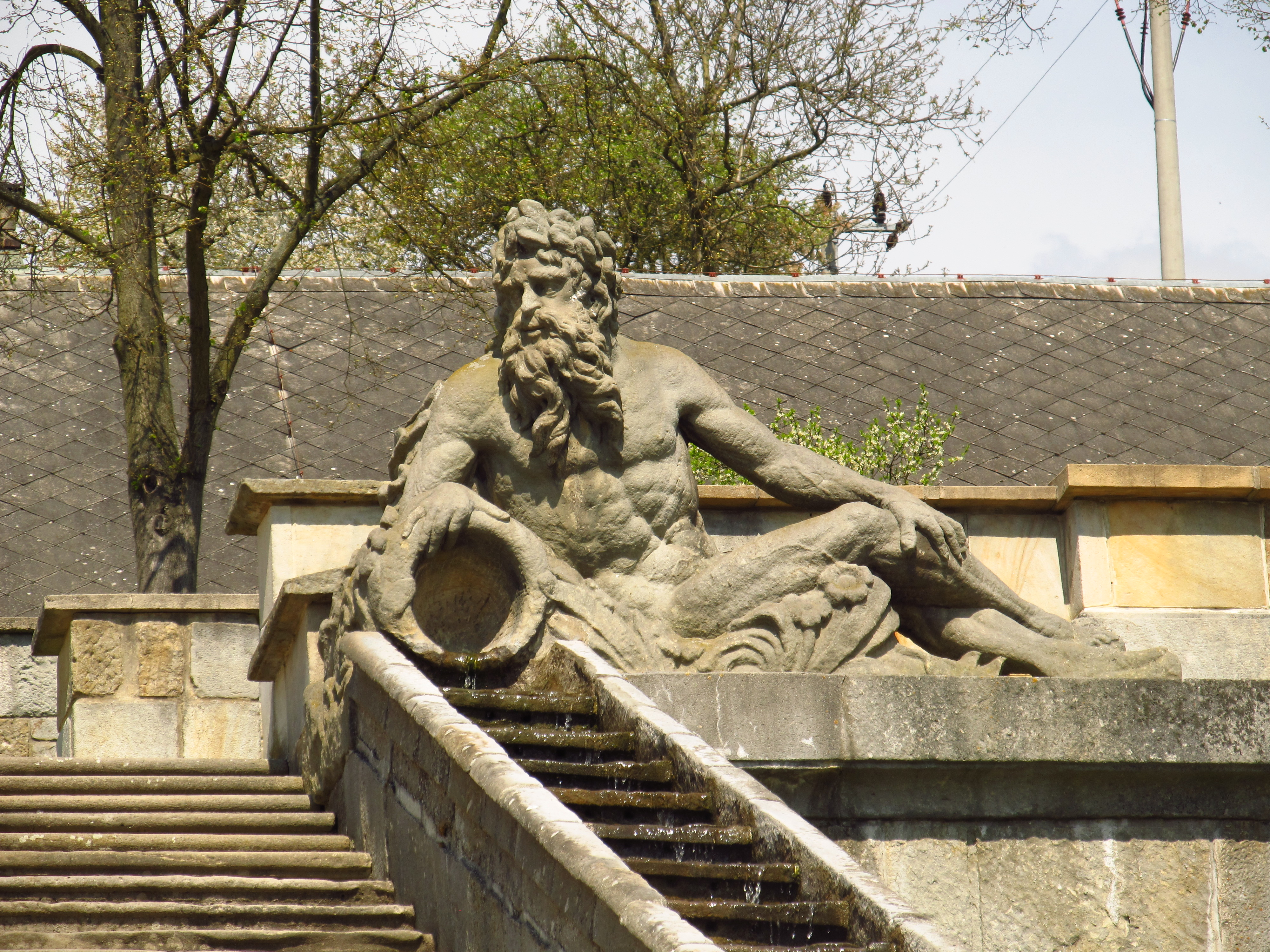 Zámek - torzo zámku s terasou a se schodištěm Kuks, Kuks.